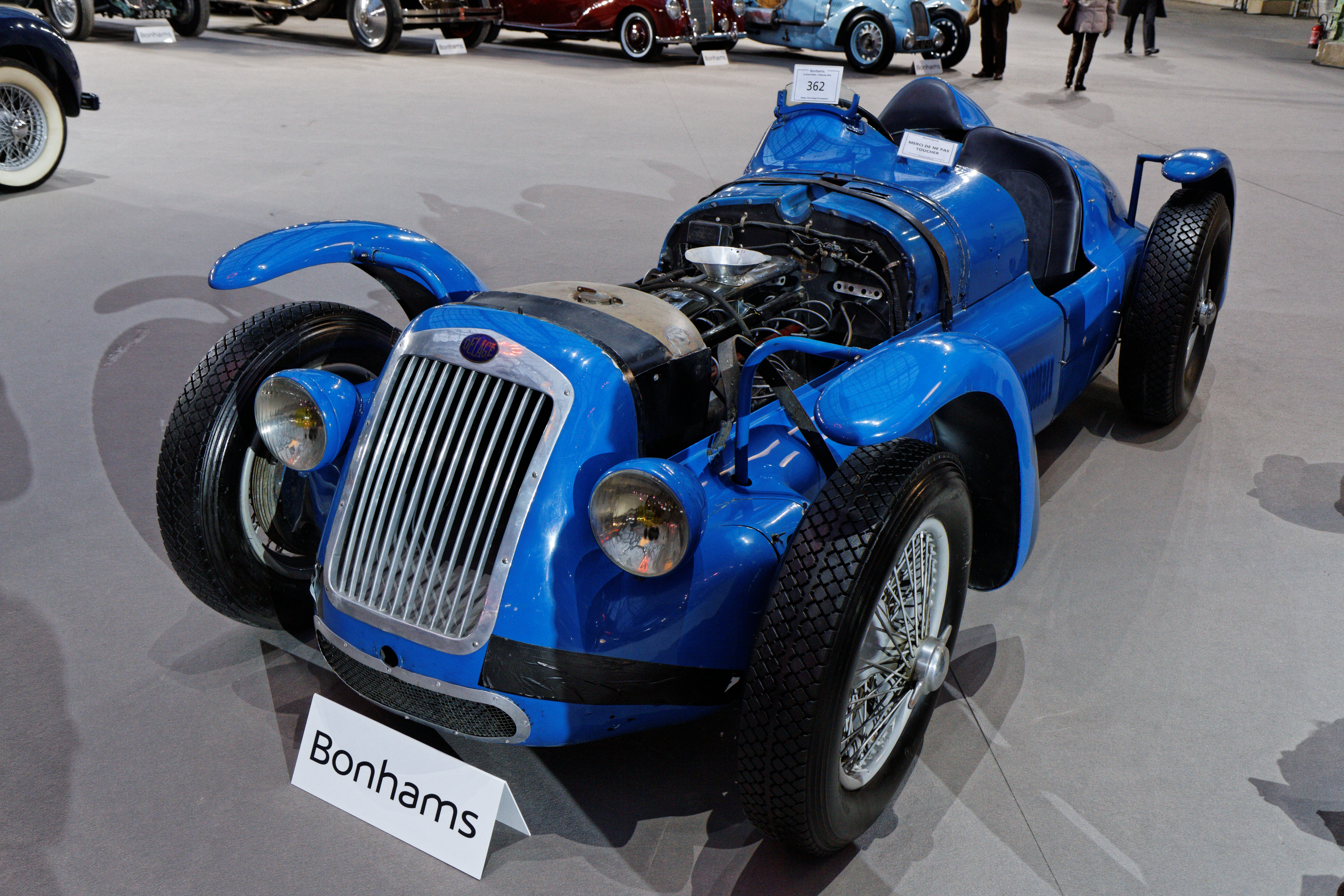 Une Voisin C23 Berline pilotée par Philippe Etancelin, Maurice Trintignant, August Veuillet et Charles Pozzi au Grand Palais lors de la vente Bonhams en février 2014.